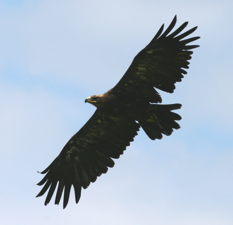 Golden Eagle Aquila chrysaetos, Pfaender Adlerwarte, Vorarlberg, Austria